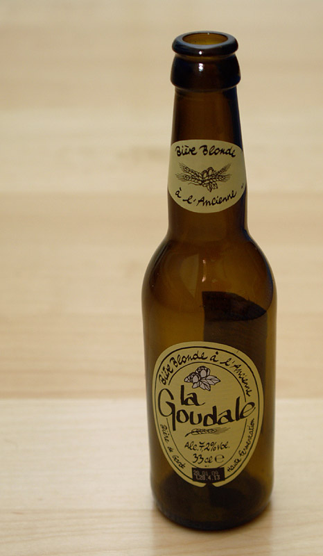 La Goudale -ale from France.